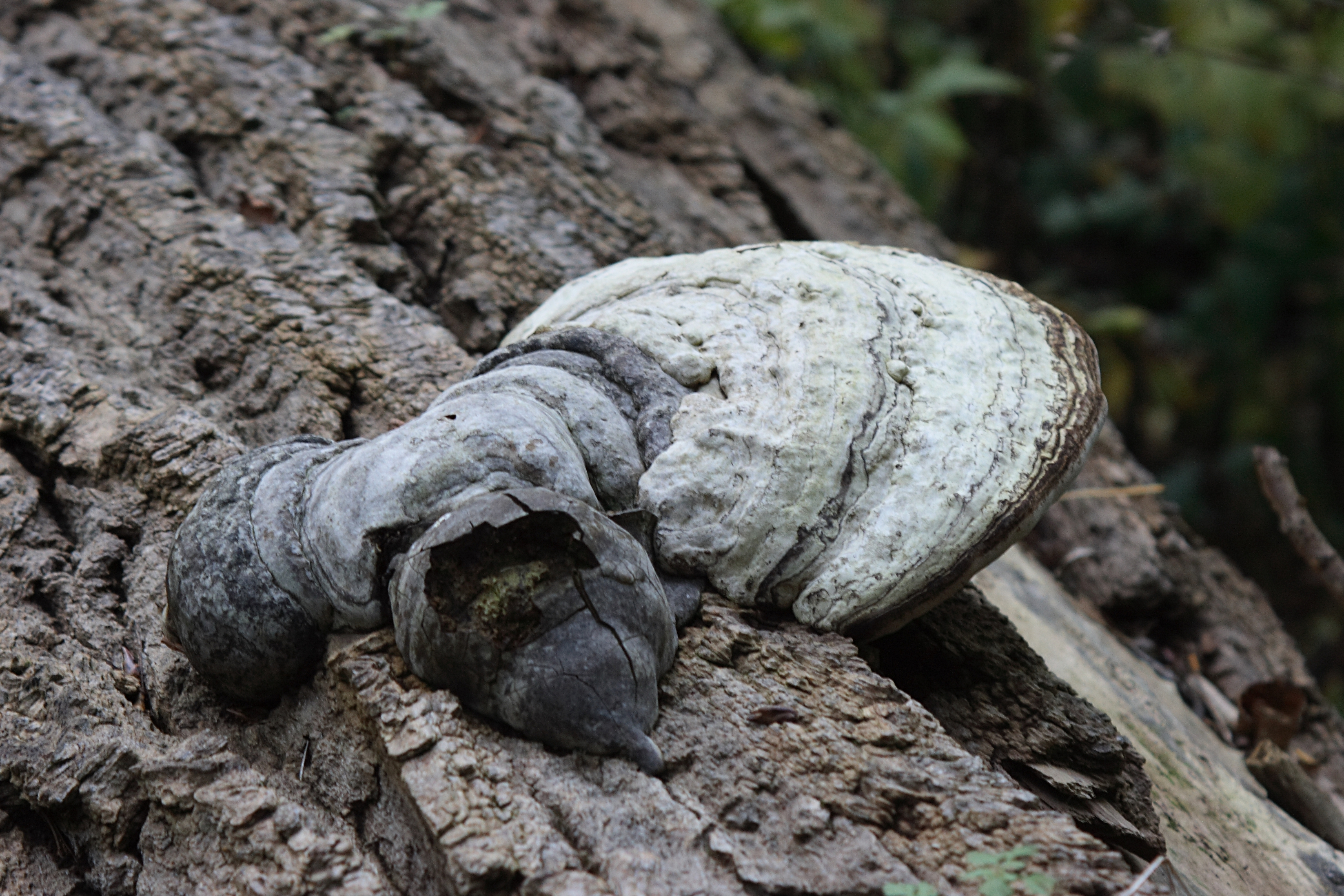 Na pokáceném stromě u mokřadu Chobot